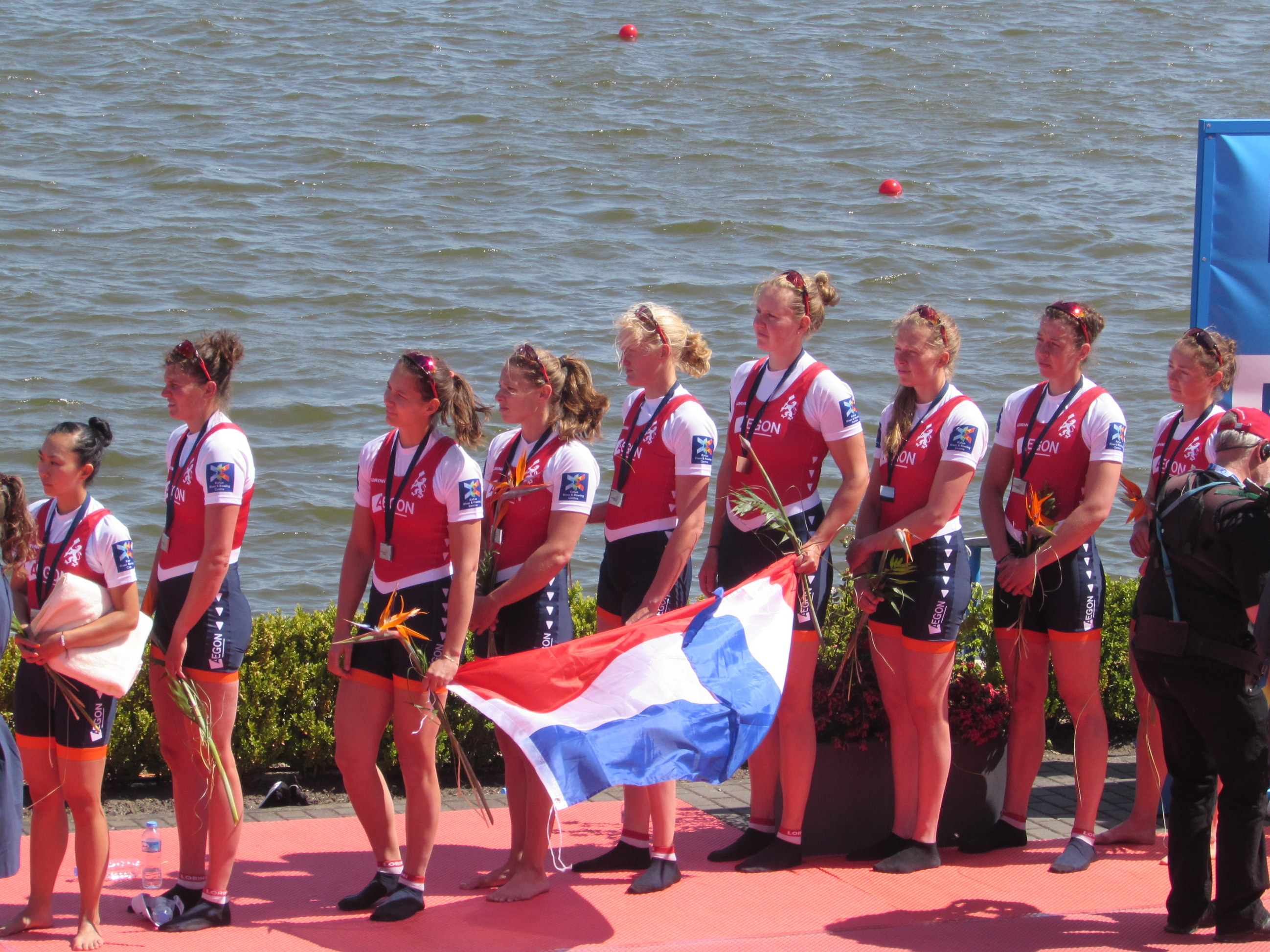 Wianka van Dorp, Sophie Souwer, Lies Rustenburg, Jose van Veen, Elisabeth Hogerwerf, Claudia Belderbos, Monica Lanz, Olivia van Rooijen,, Ae-Ri Noort, Ruder-EM 2016